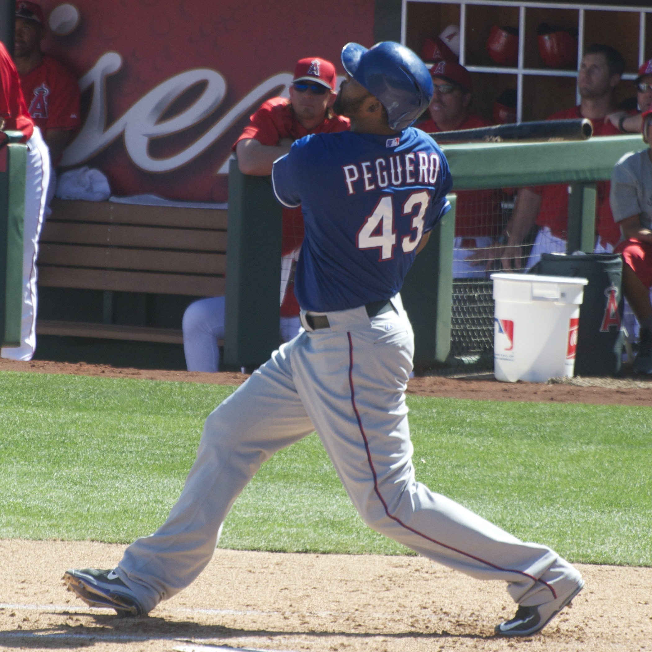 Carlos Peguero